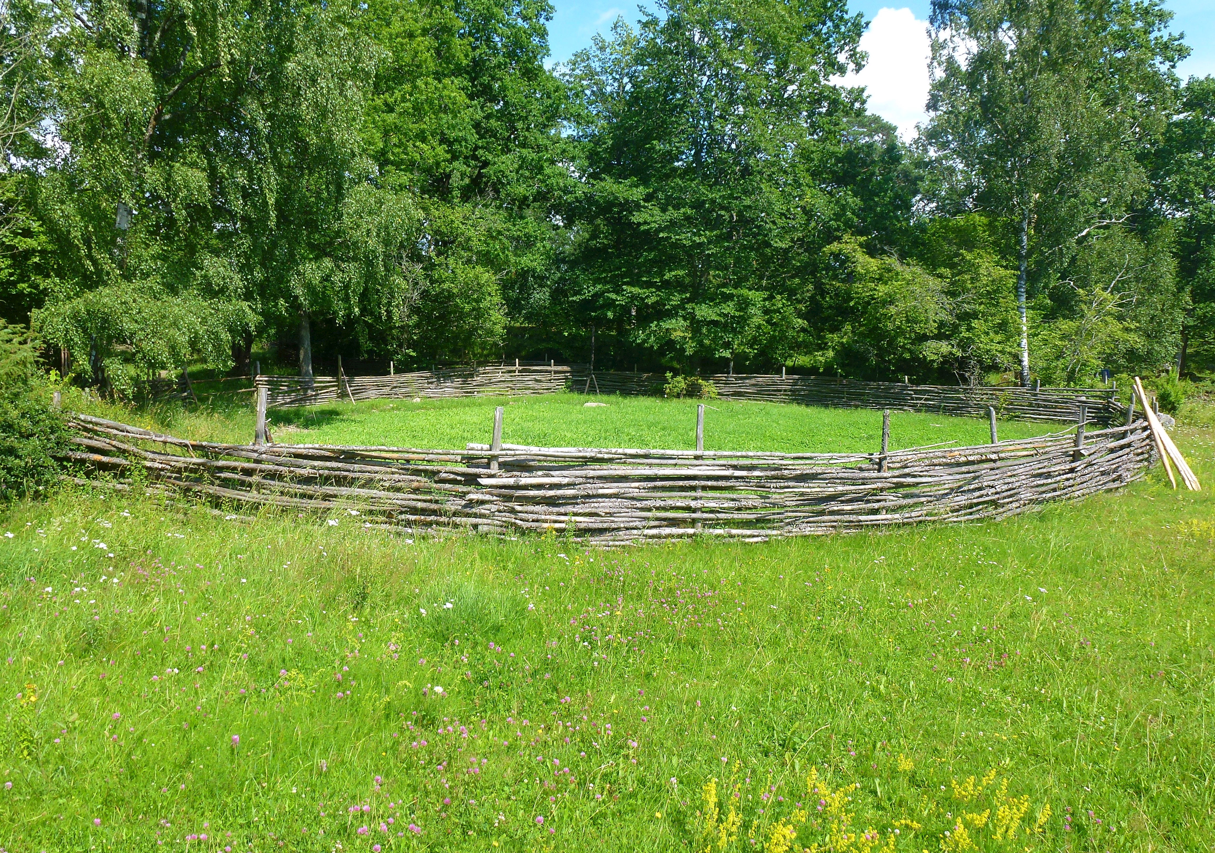 Bögs gård, järnålderslandskap med fläteshägnad